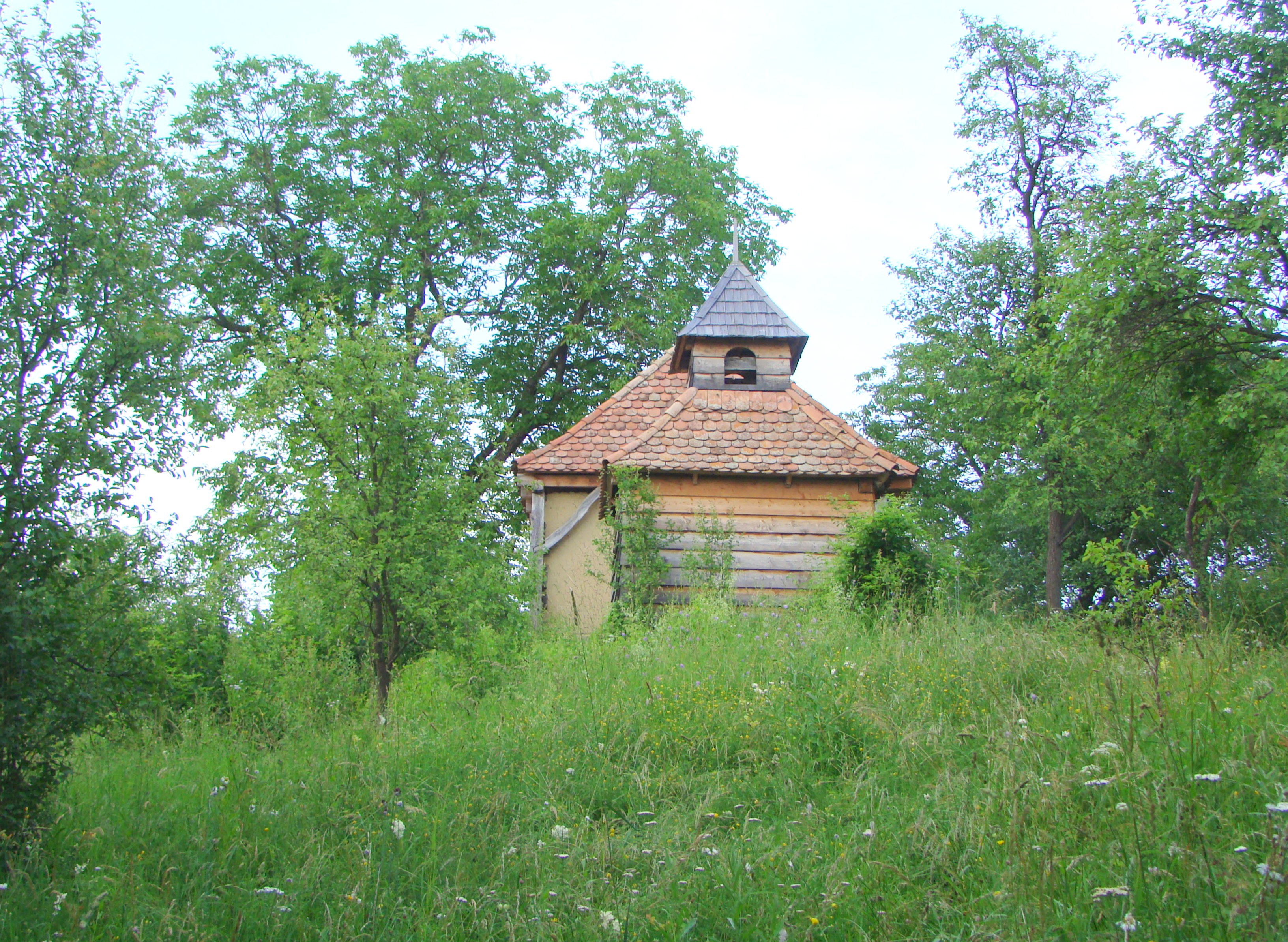 Biserica de lemn „Cuvioasa Paraschiva”, sat Grânari; comuna Jibert, str. Școlii, în cimitirul ortodox vechi sec. XVIII